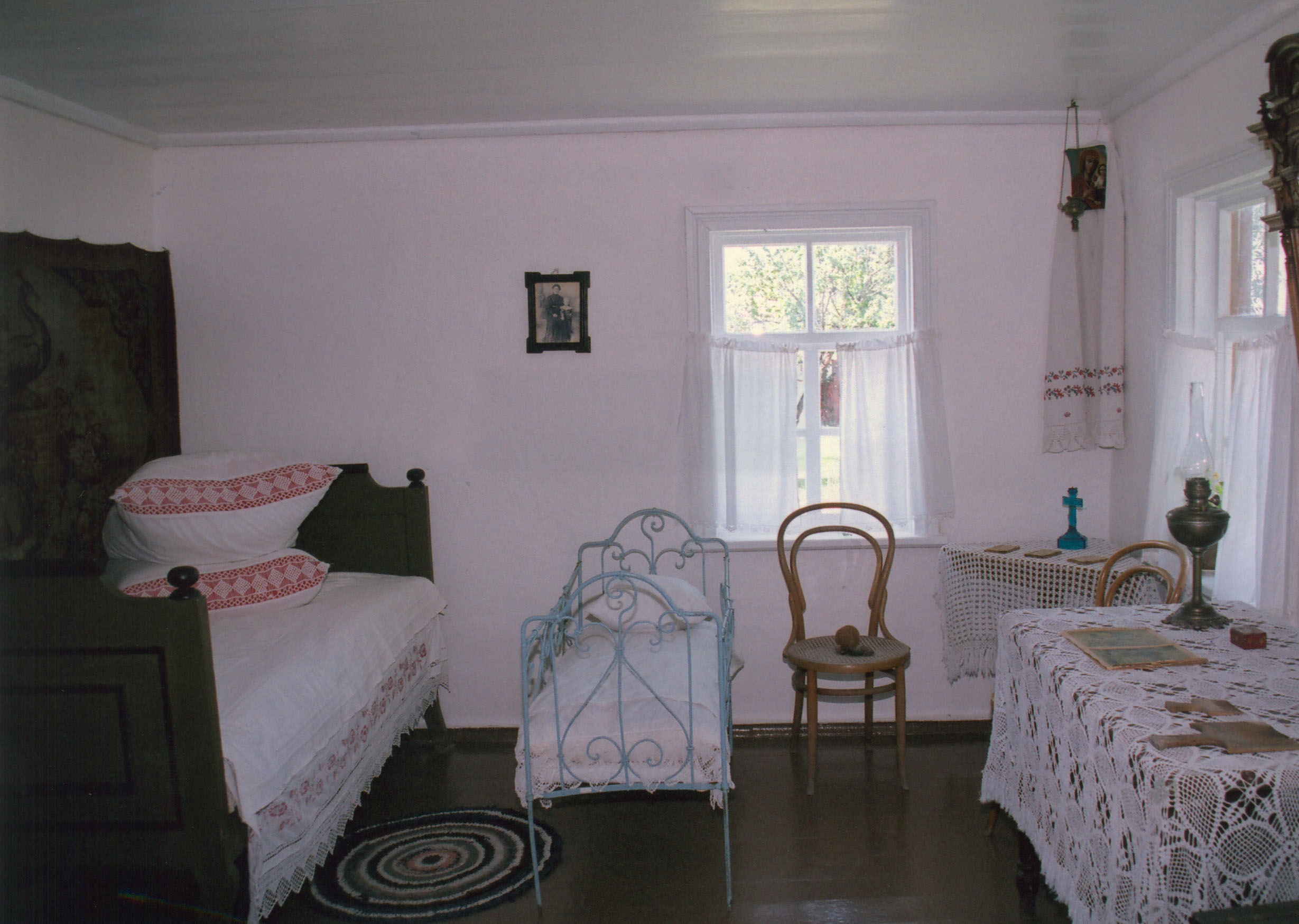 На снимке: домик Шолохова. Русский писатель Михаил Александрович Шолохов родился 11 (24) мая 1905 года на хуторе Кружилин казачьей станицы Вёшенская Войска Донского (ныне Шолоховского района Ростовской области), на юге России. Шолохов – внебрачный сын украинки, вдовы донского казака, А. Д. Кузнецовой (1871-1942) и богатого приказчика, сеющего хлеб на арендованной казачьей земле, управляющего паровой мельницы (сына купца, из Рязанской губернии) А. М. Шолохова (1865-1925).